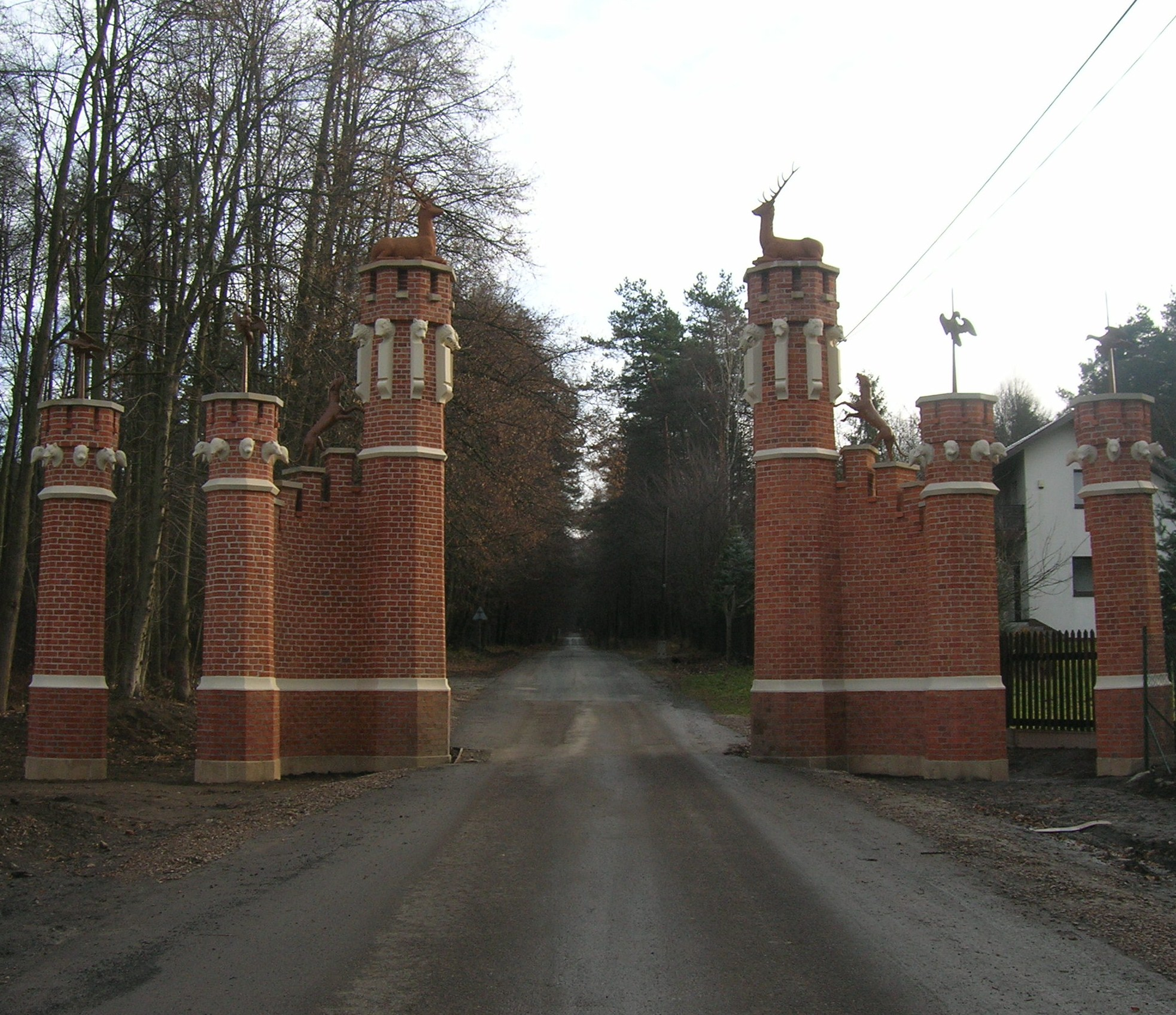 Brama Zwierzyniecka.Tenczynek.Wdok od północy